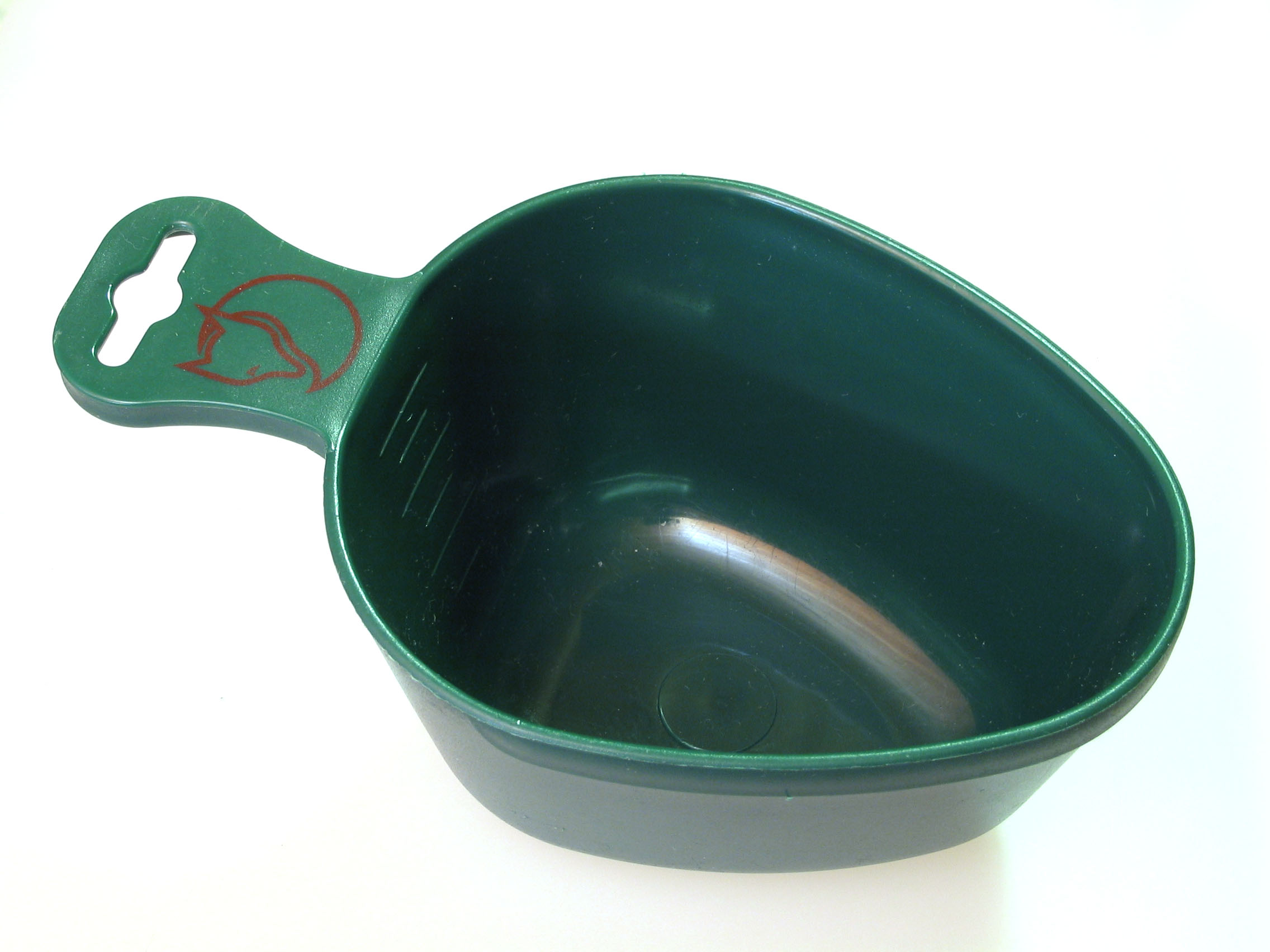 Kåsa, photo taken in Sweden